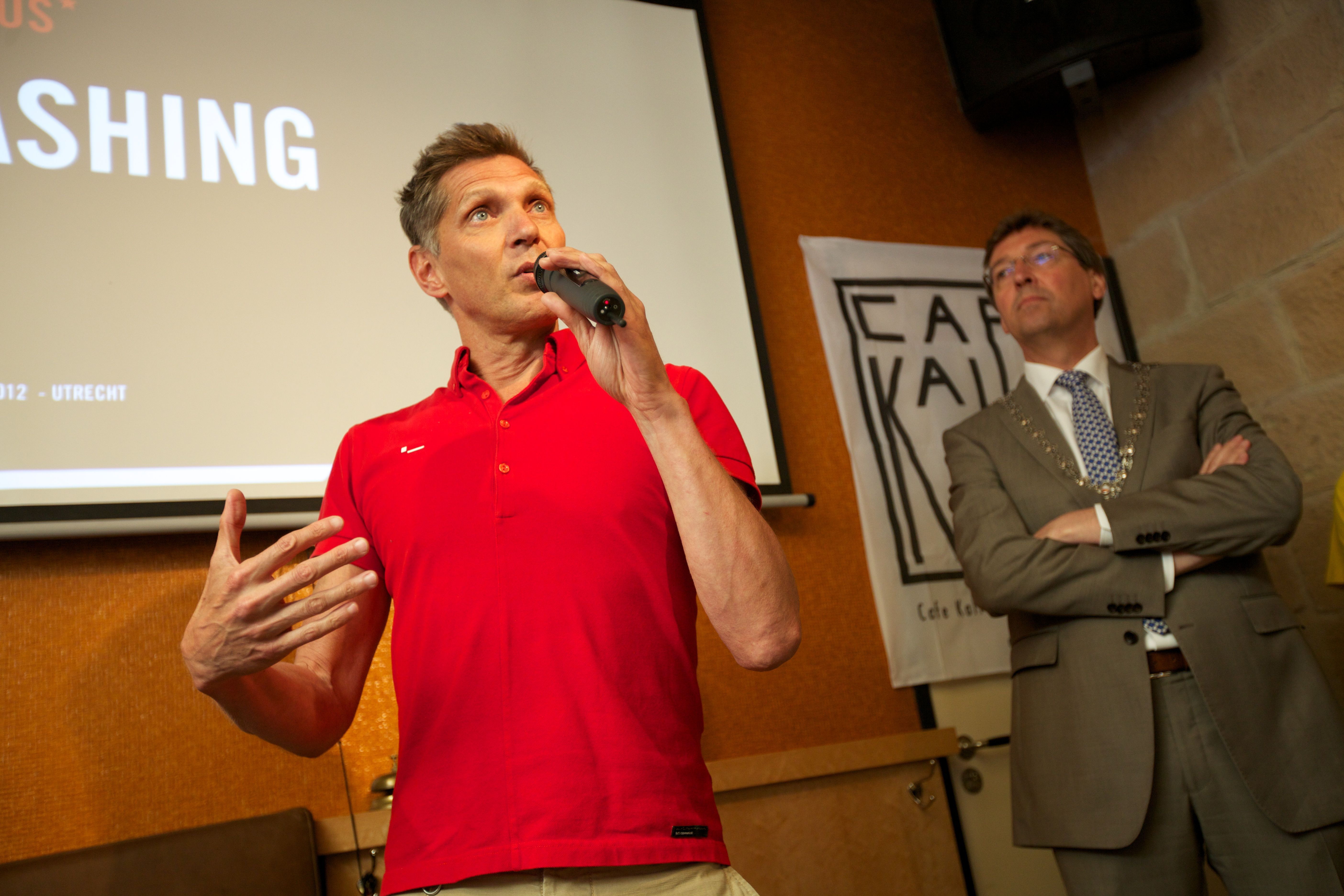 Lancering van de anti homogeweld app "Bashing" in Café Kalff in Utrecht met fotograaf Erwin Olaf, burgemeester Aleid Wolfsen, Outrage! voorzitter Björn Pius, Yves Aerts, Gaykrant hoofdredacteur Henk Krol en de voorzitter college van procureurs-generaal van het Openbaar Ministerie Mr. H.J. Bolhaar.